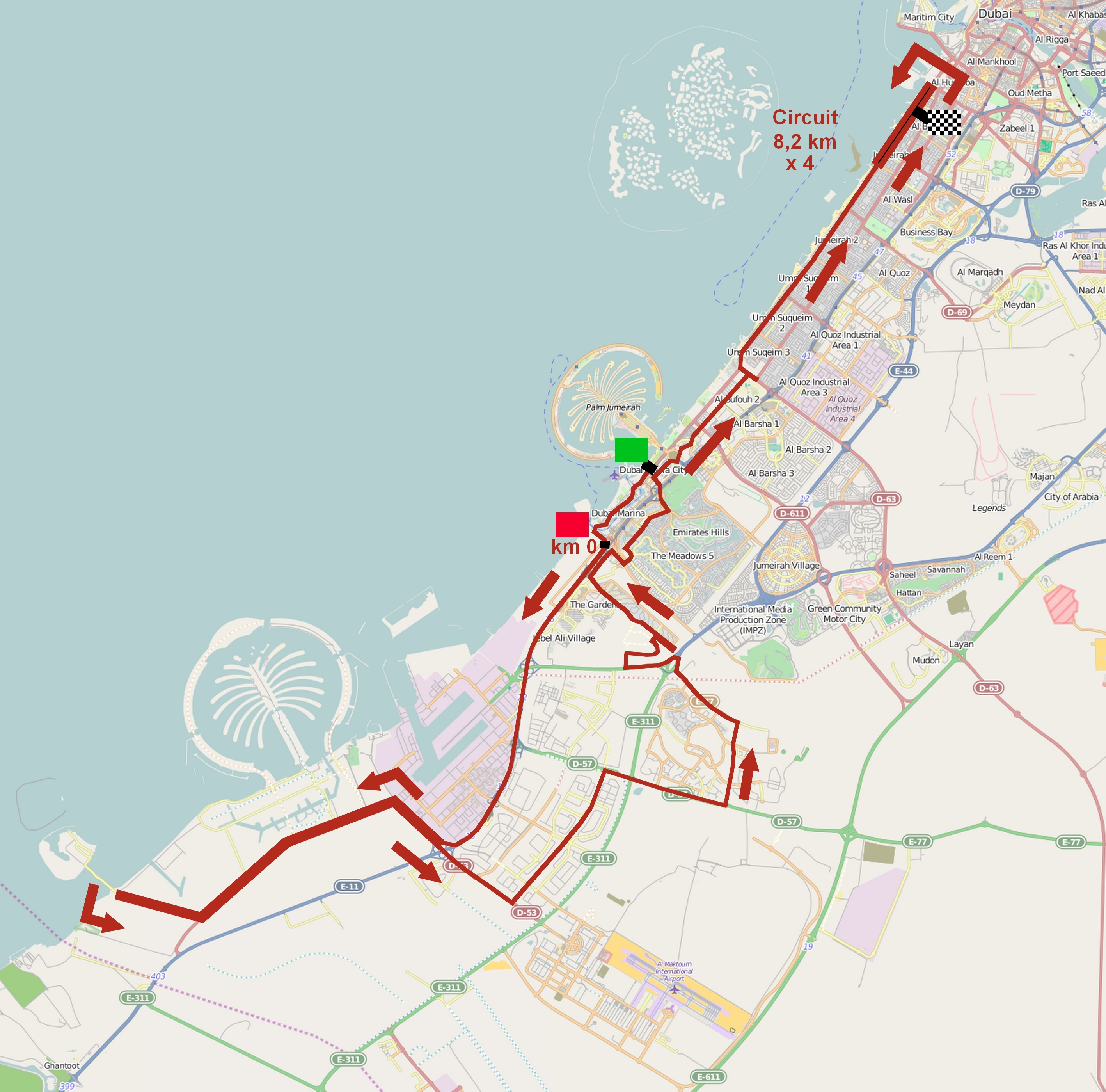 Parcours de la première étape du Dubaï Tour 2015. This map may be incomplete, and may contain errors. Don't rely solely on it for navigation.